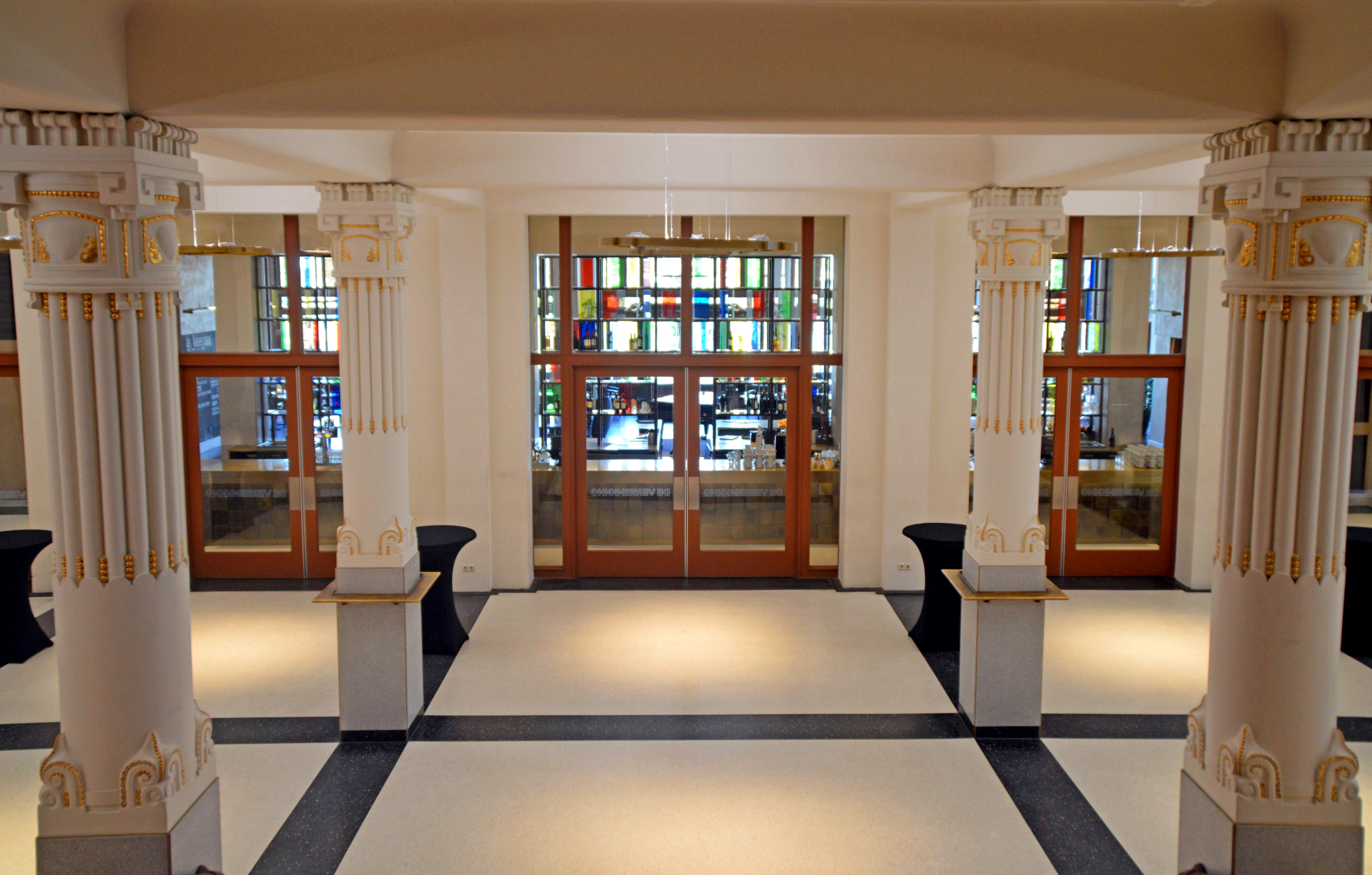 Zuilenhal Entree Café Concertgebouw de Vereeniging